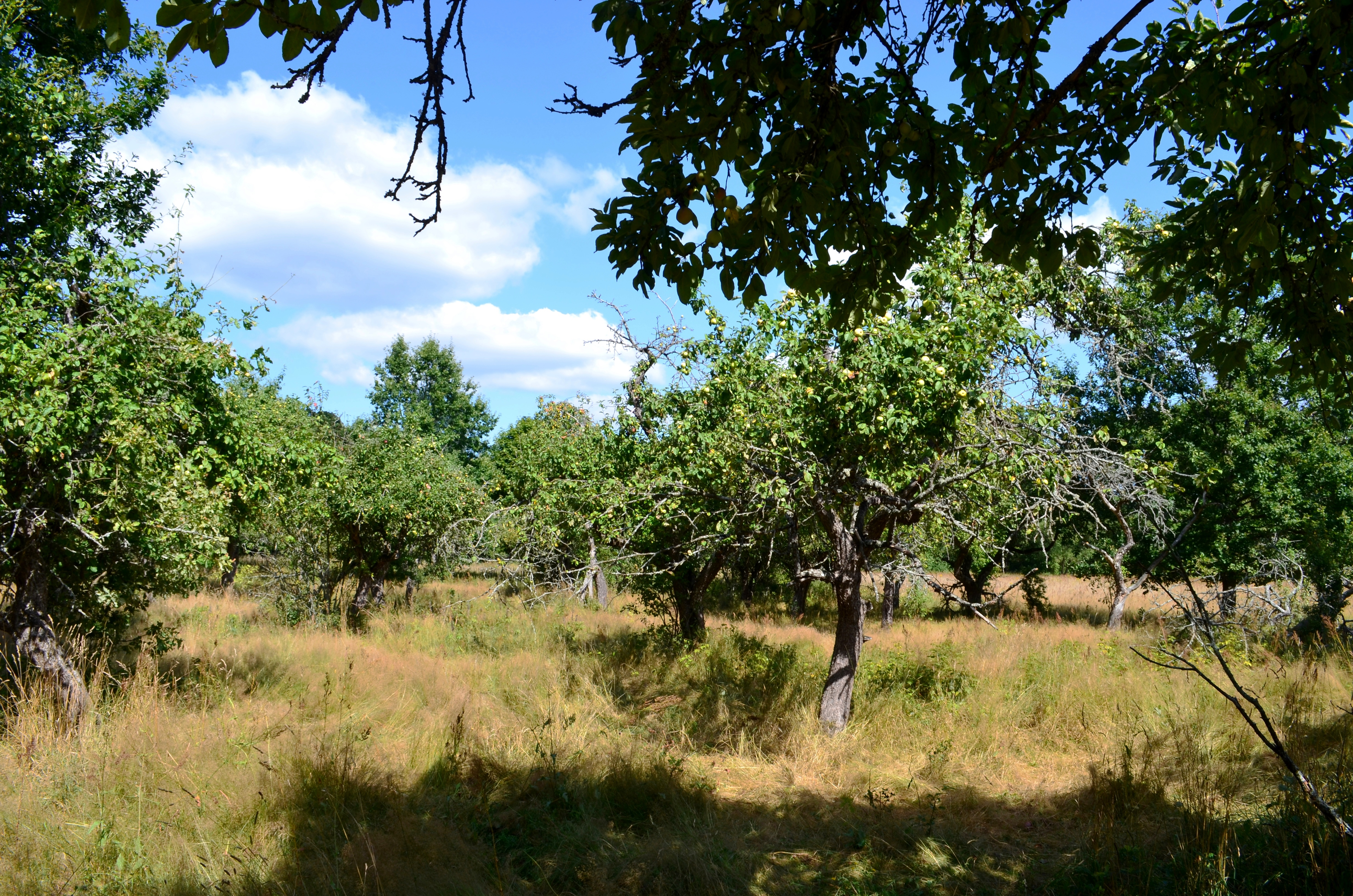 T. Ivanausko obelynas, Pogarenda, Varėnos raj.